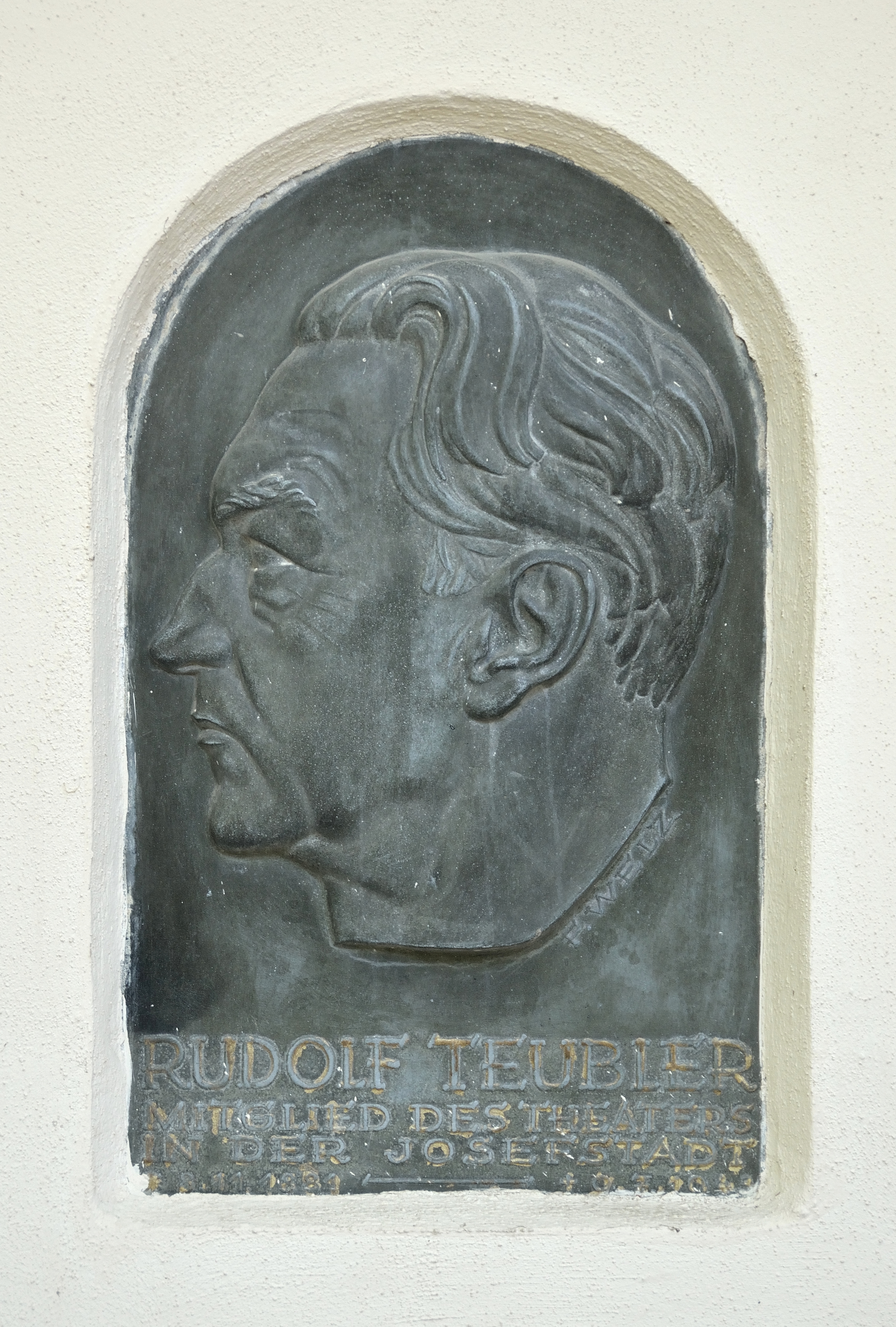 Urnengrab von Rudolf Teubler im Urnenhain Simmering, Relief von F. Welz. Rudolf Teubler war Mitglied des Theaters in der Josefstadt (8.11.1881 - 9.7.1943)